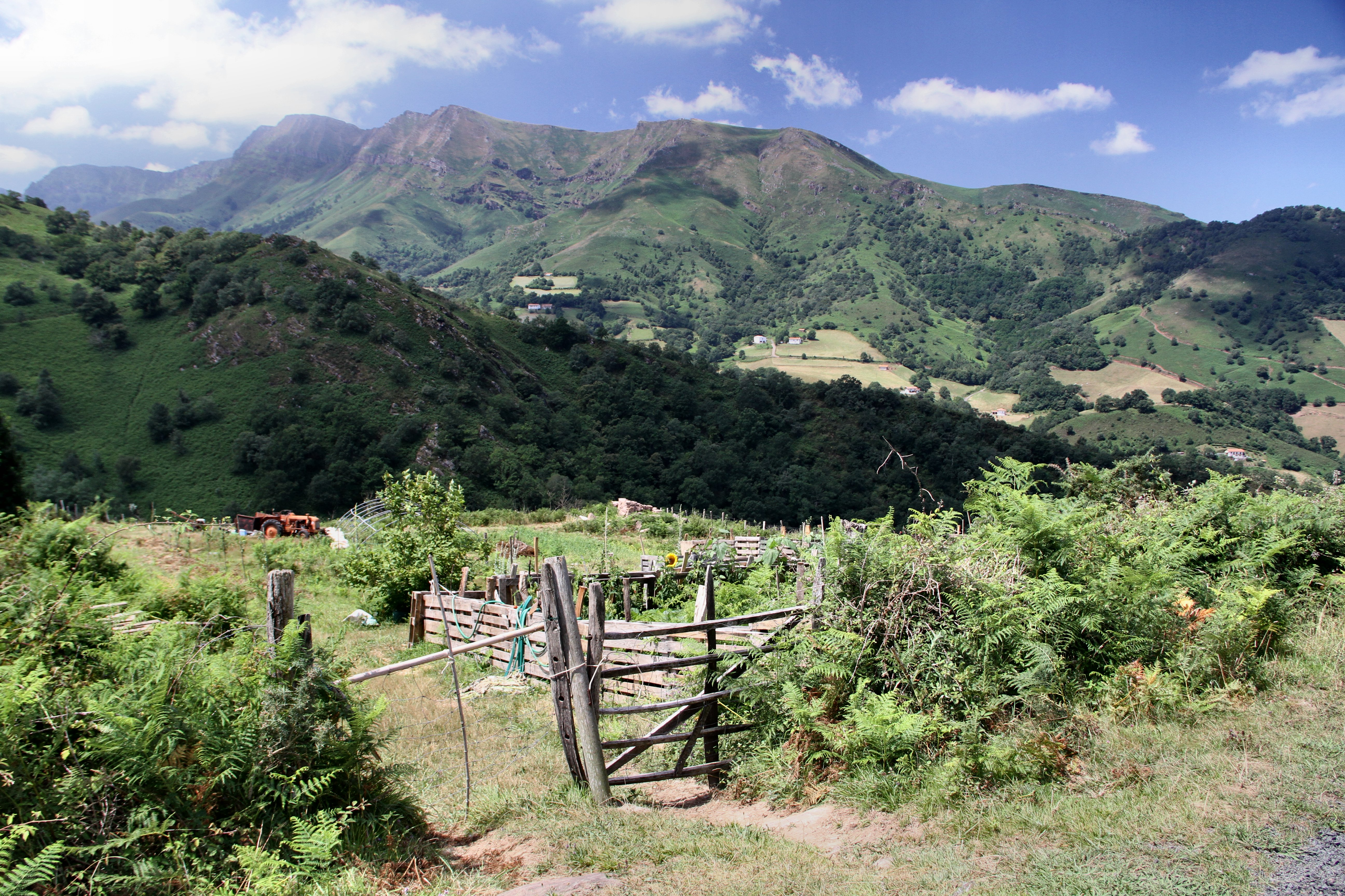 Paysage basque de la Basse Navarre aux environs de Saint Jean Pied de Port, Juillet 2010 Basque landscape of the Lower Navarre around Saint Jean Pied de Port, July 2010